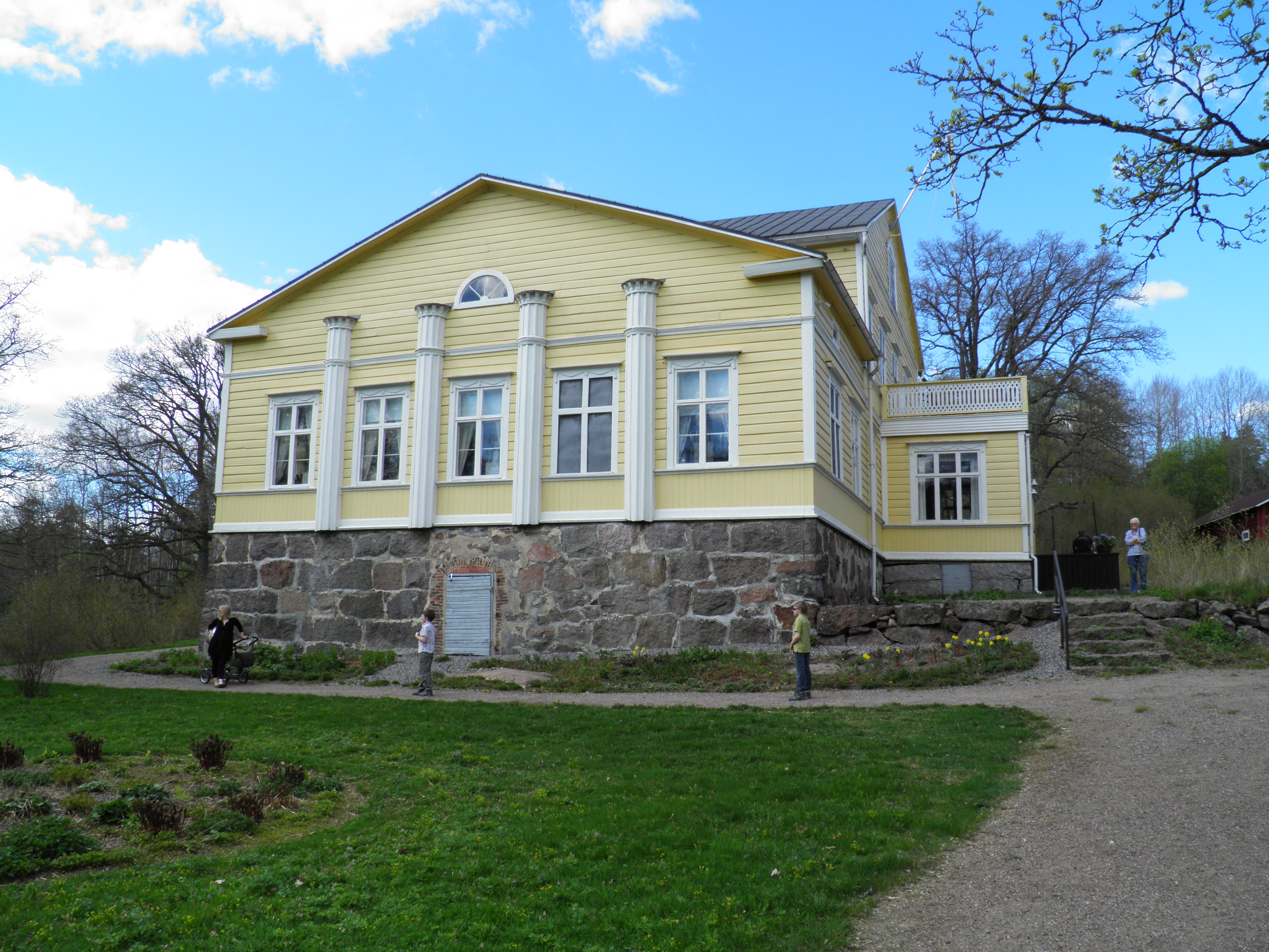 Kaikki oikeudet Mika Wallenius